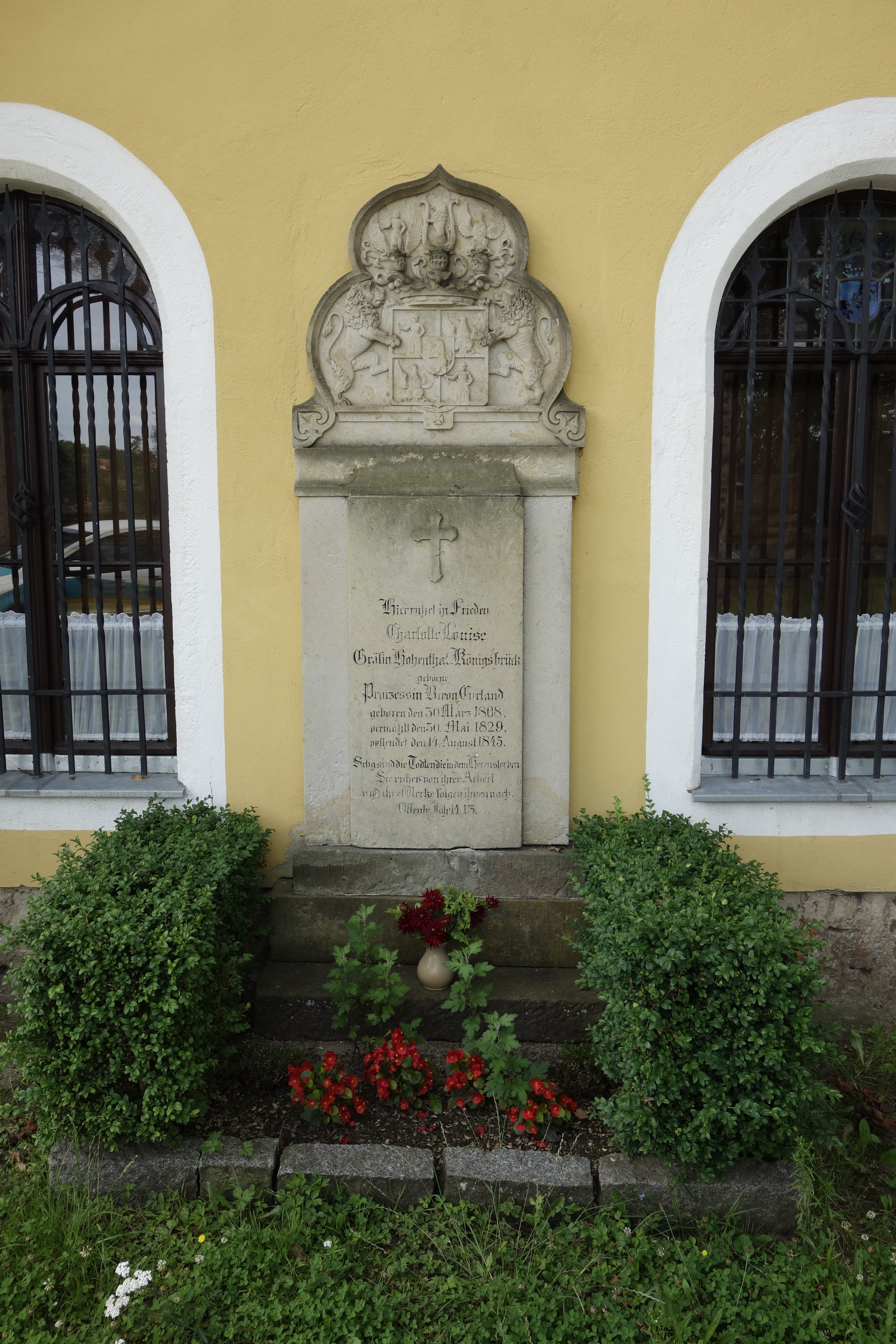 Kirche Königsbrück Juli 2017 (5)